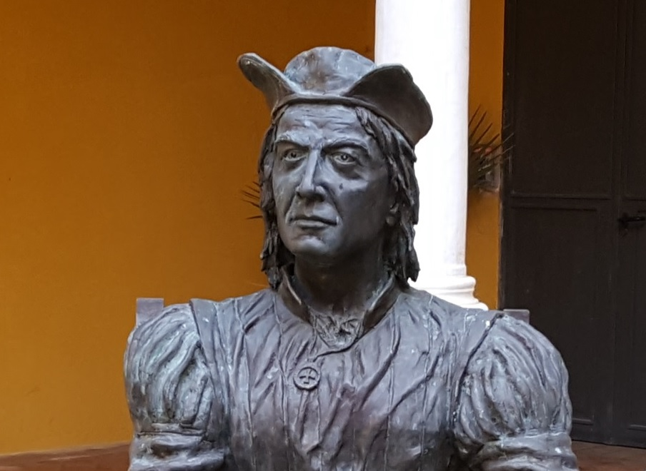 Estatua de Pedro Alonso Niño,obra del escultor asturiano Anselmo Iglesias Poli. Se encuentra ubicada en el Convento de San Francisco de Moguer. Primera pieza del futuro monumento, que incluye a sus hermanos y la Nao Santa María.